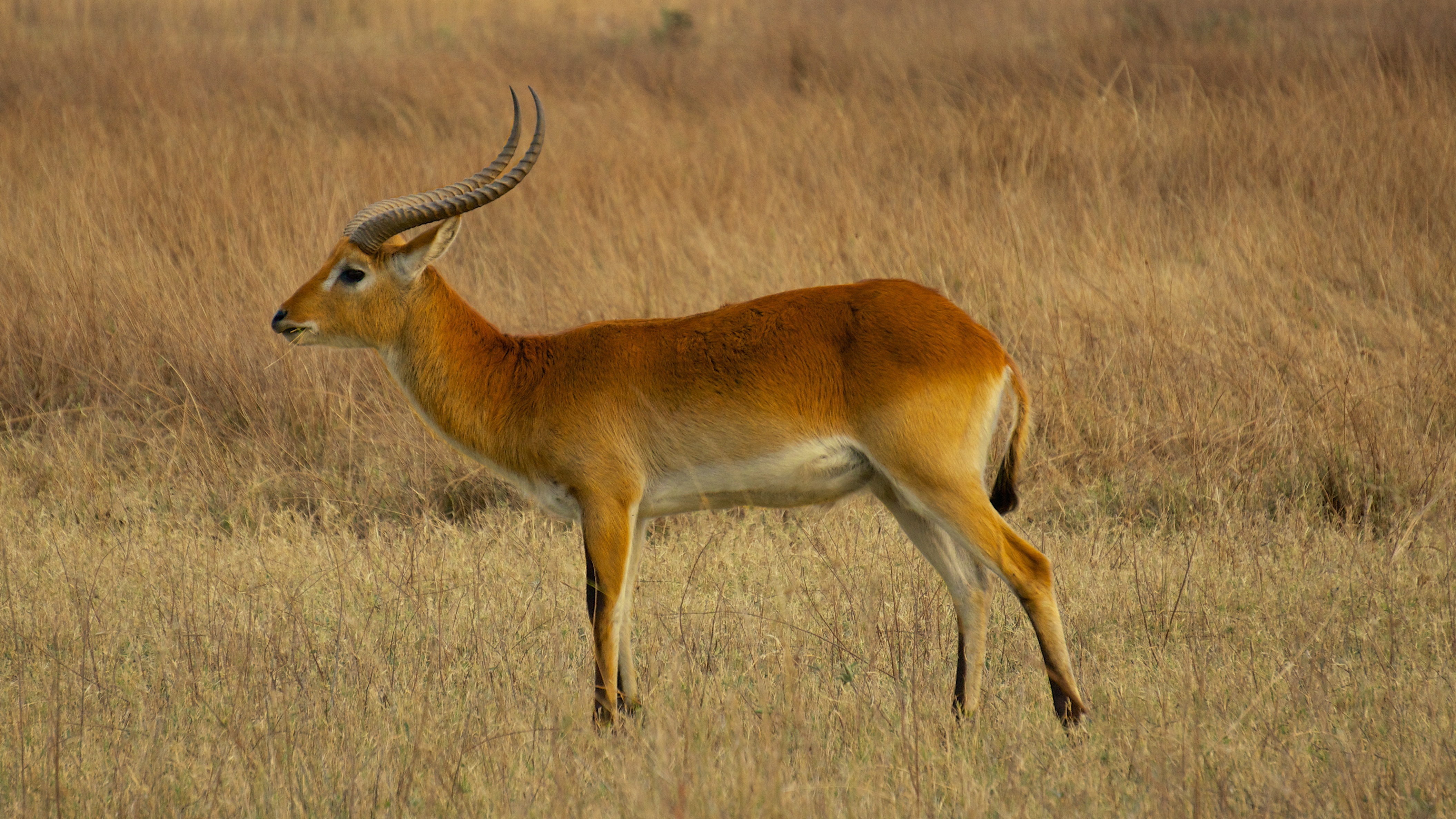 Antelope